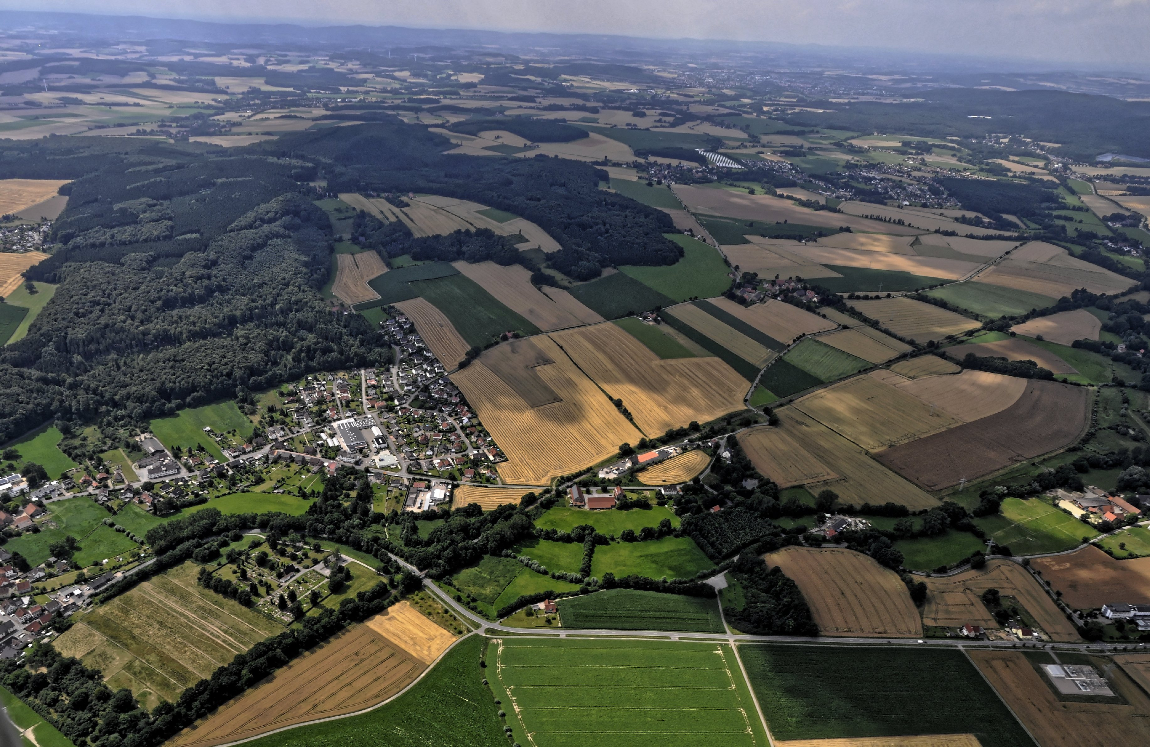 Bilder vom Flug Nordholz-Hammelburg 2015: Bega